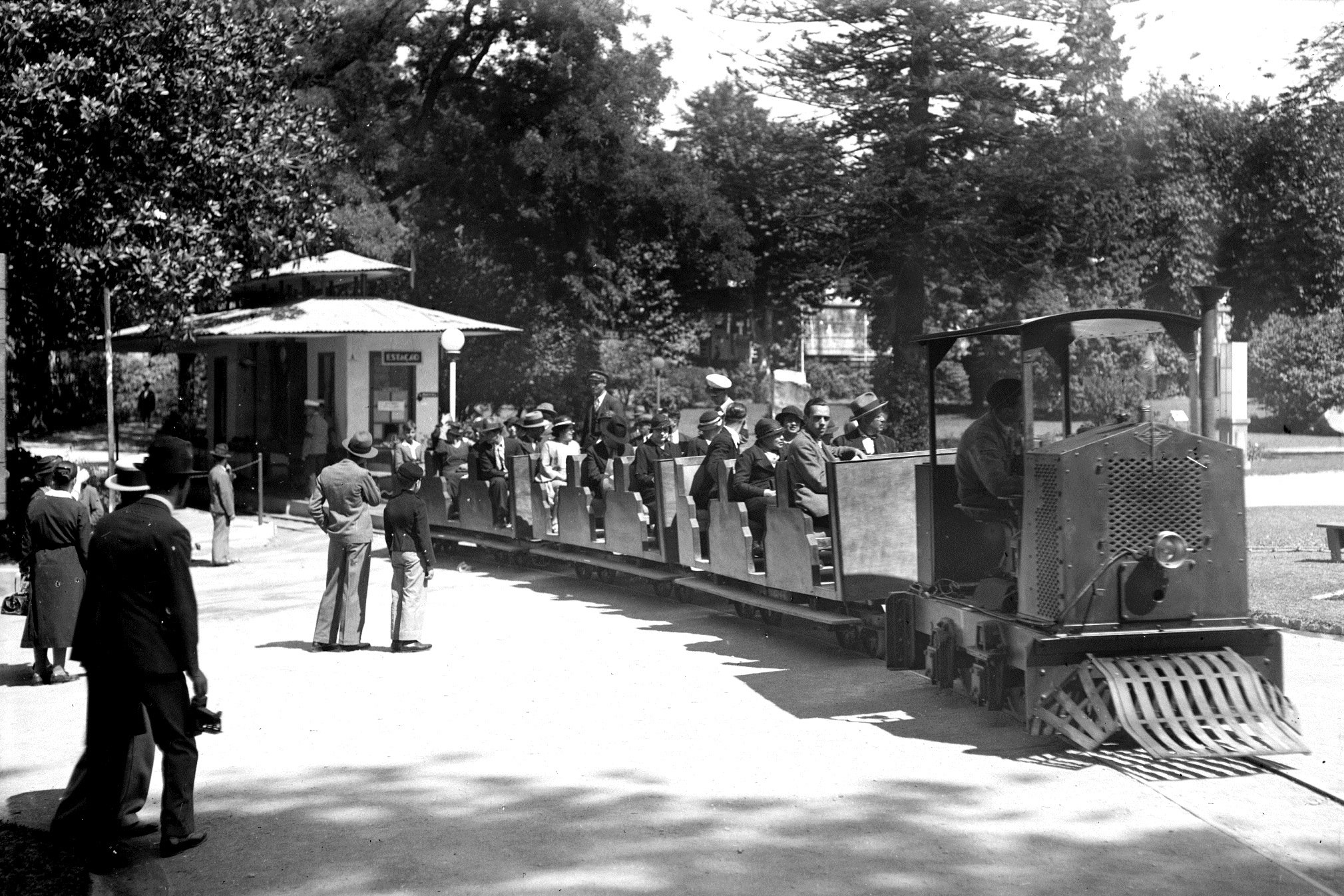 Comboinho nos jardins do antigo palácio de Cristal, em 1934